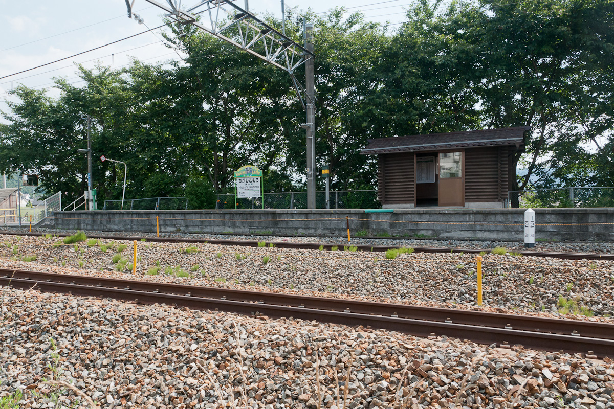 JR東日本小海線東小諸駅。